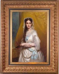 Repräsentatives Kniestück einer Damelabel QS:Lde,"Repräsentatives Kniestück einer Dame"